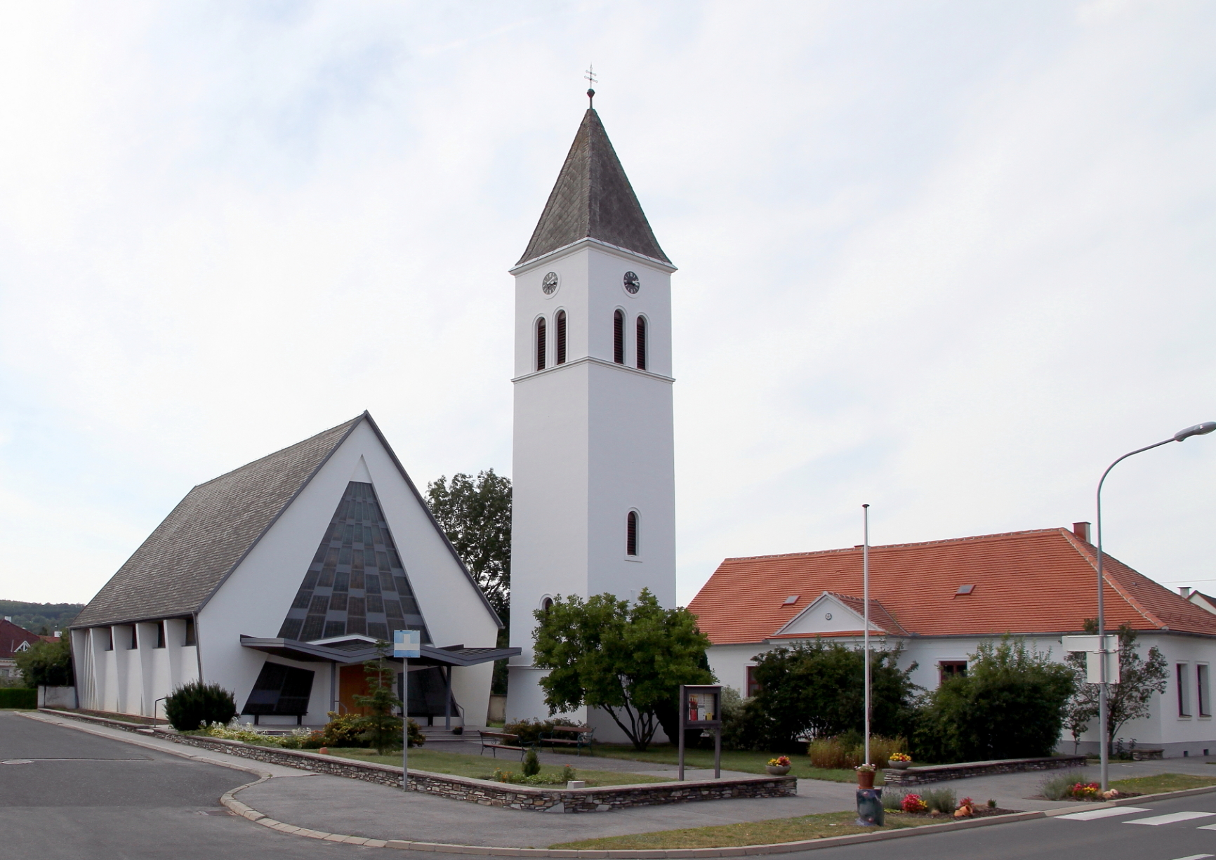 Die Evang. Pfarrkirche A.B. von Stoob. Kirchenschiff wurde 1961/62 errichtet, der Turm 1948 und rechts das ehemalige Pfarrhaus 1830.